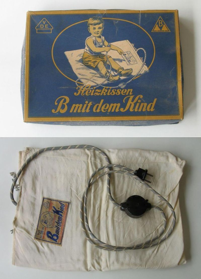 Heizkissen mit Originalverpackung, Deutschland um 1939